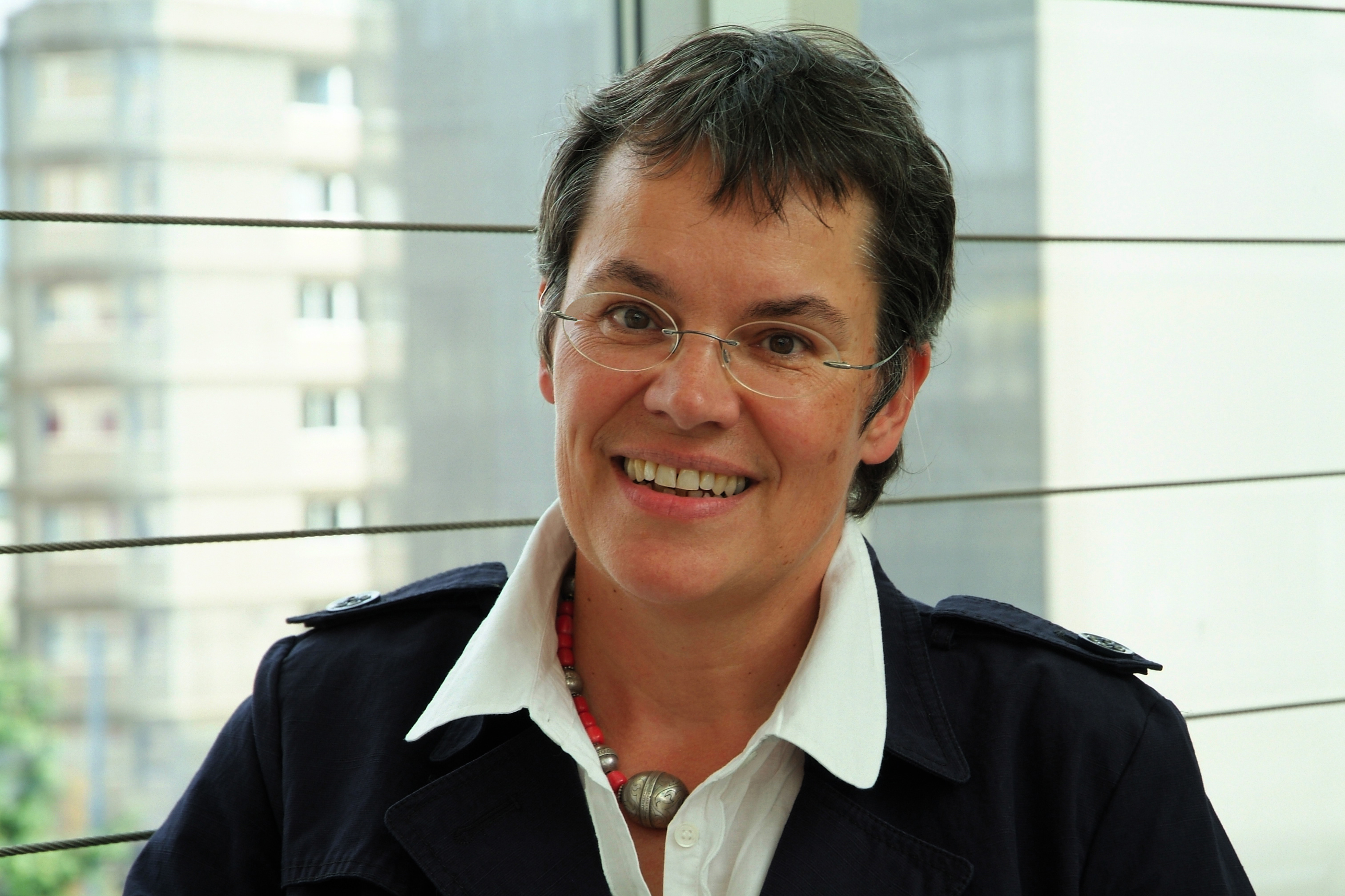 Portrait de Liliane Maury Pasquier